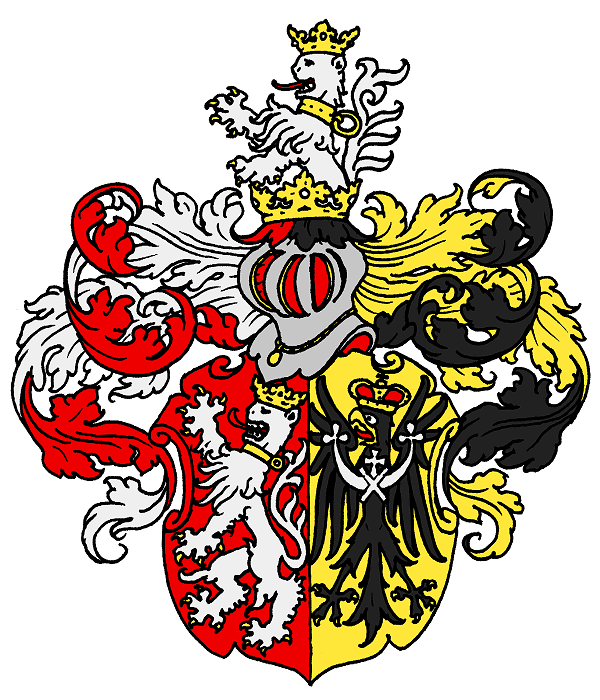 Stammwappen der von Burghauß